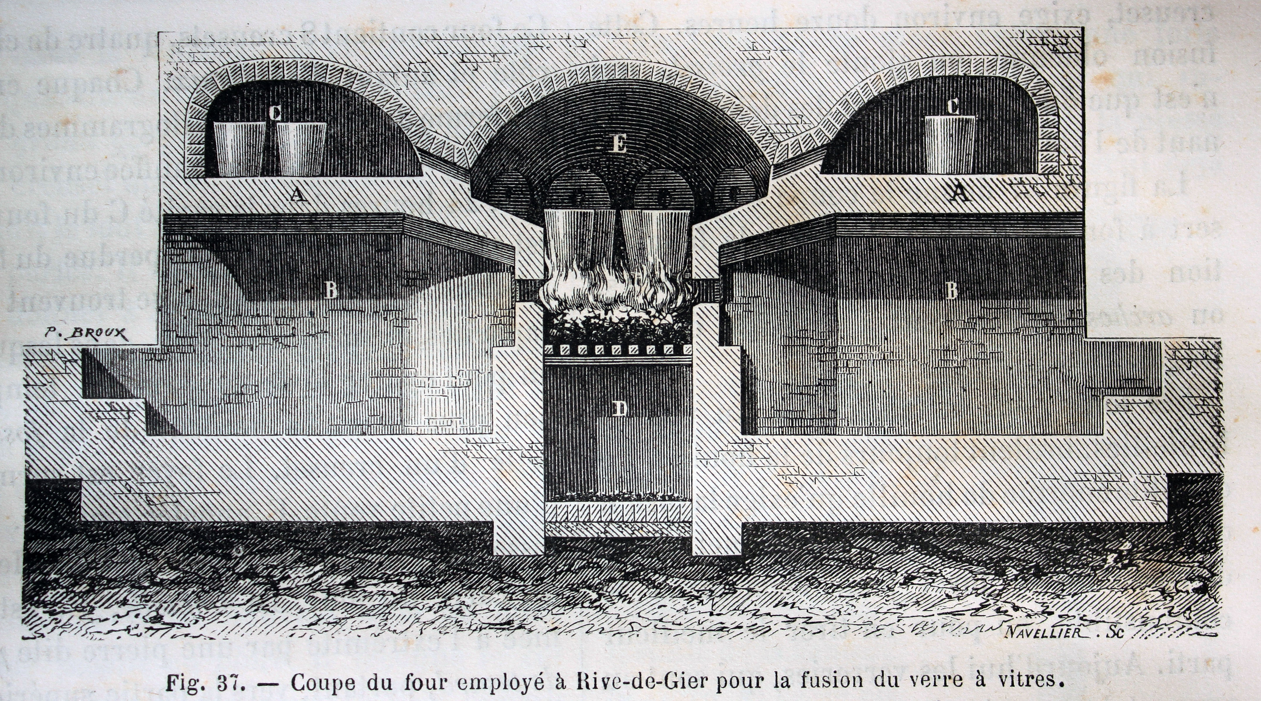 "Coupe du four employé à Rive-de-Gier por la fusion du verre à vitres". Ilustraciones de la obra : Les merveilles de l'industrie ou, Description des principales industries modernes / par Louis Figuier. - Paris : Furne, Jouvet, [1873-1877]. - Tome I